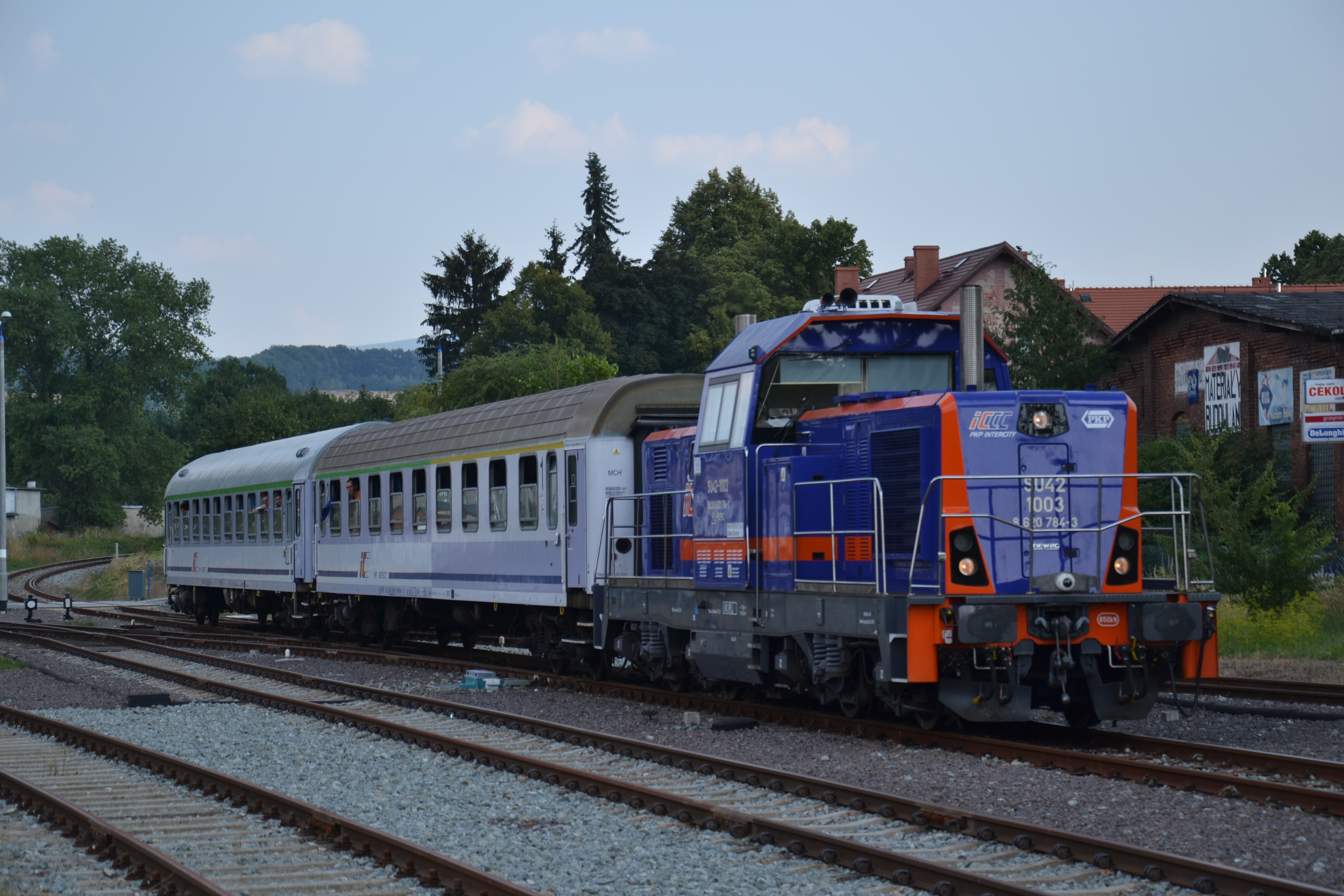 SU42-1003 PKP Intercity z TLK "Karkonosze" wjeżdża na stację Kudowa Zdrój This photo was taken during Railway Wikiexpedition 2015 set up by Wikimedia Polska Association in cooperation with Fundacja Grupy PKP.You can see all photographs in category Wikiekspedycja kolejowa 2015.